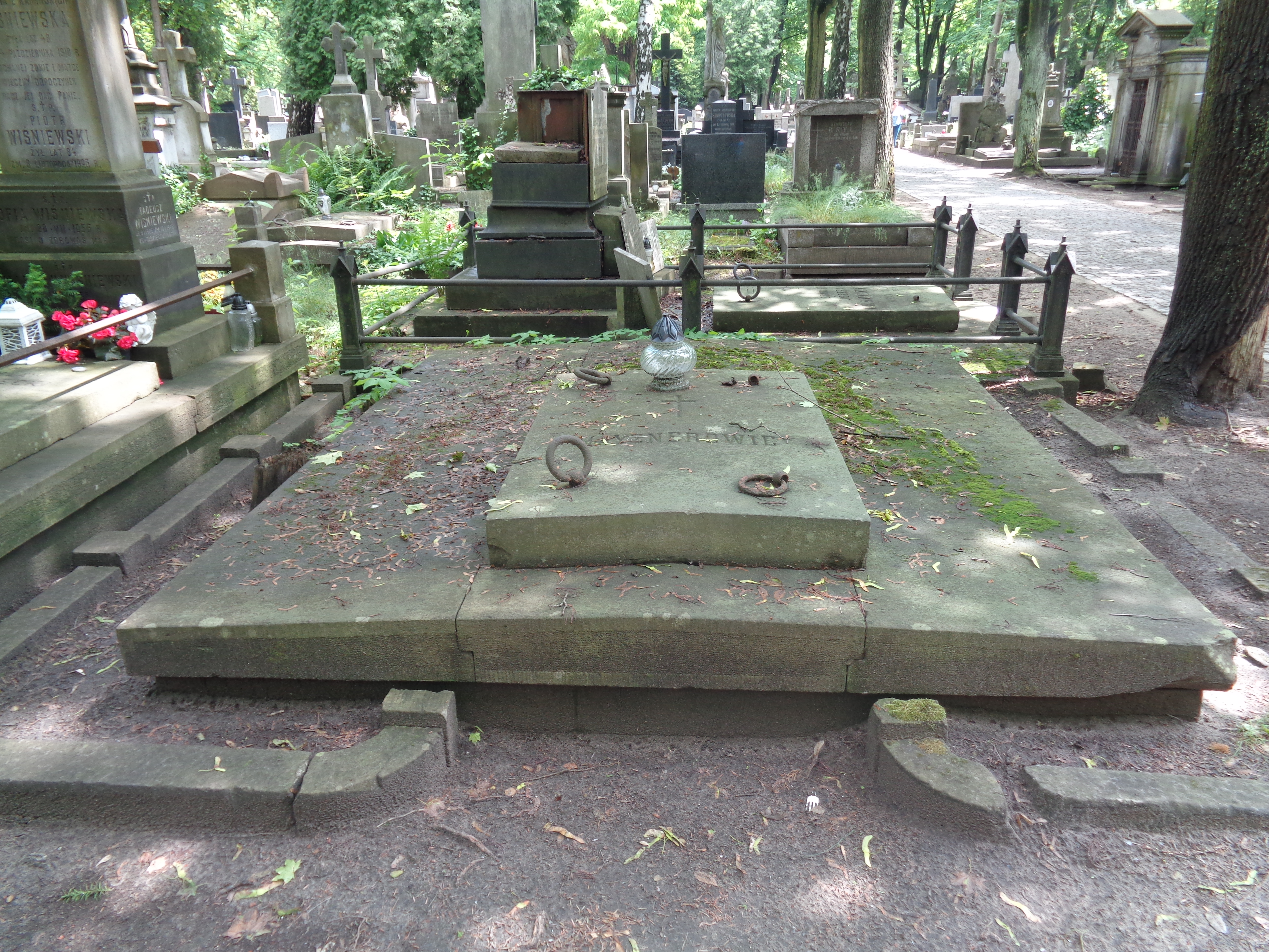 Grób Tadeusza Mayznera na Cmentarzu Powązkowskim